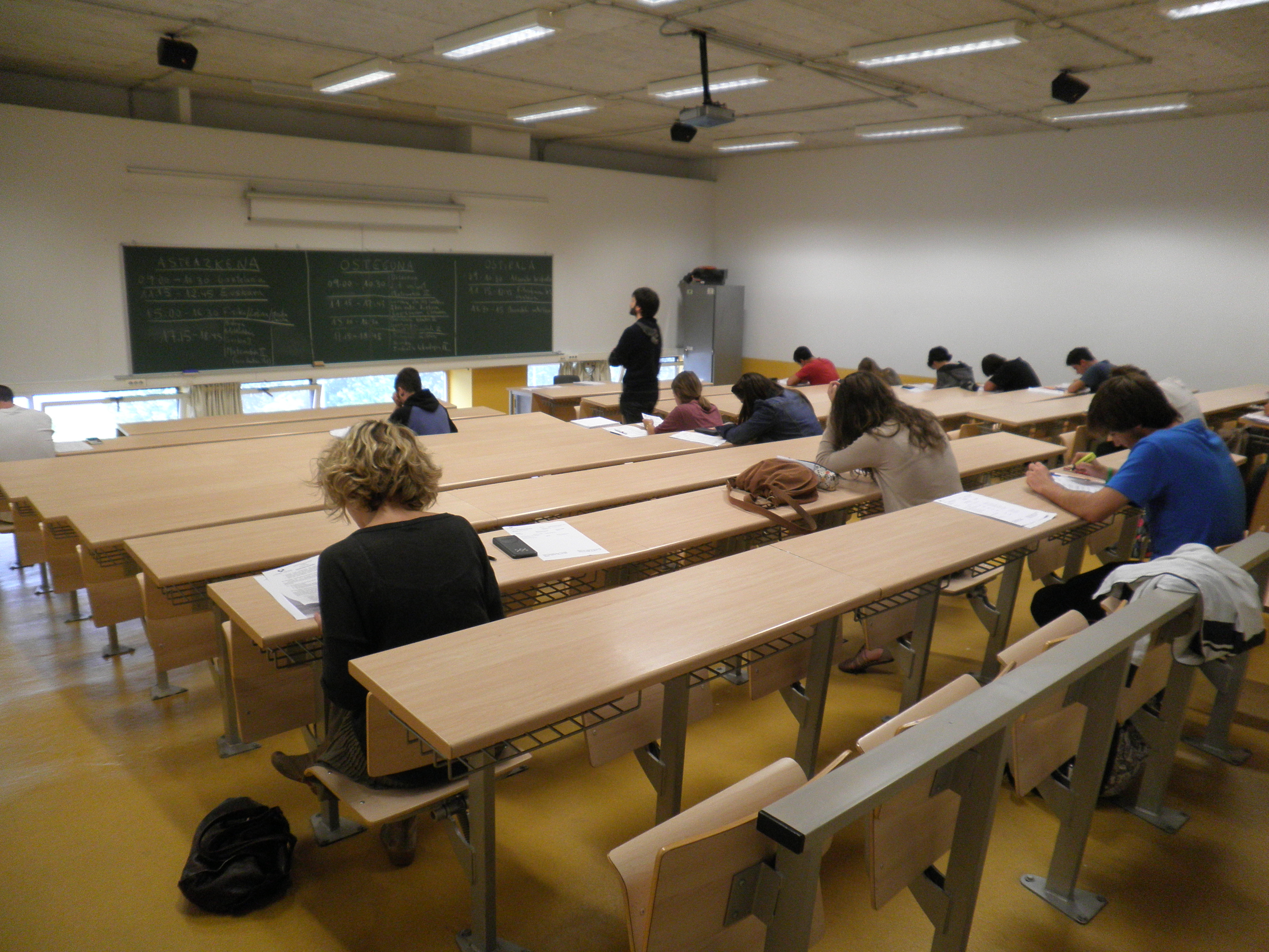 Selektibitatea Donostiako Aulategian. Arbelan, azterketen ordutegia.